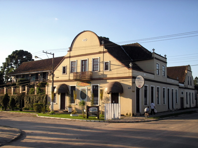 Restaurante Obra Prima, no centro de Piraquara (Grande Curitiba), PR, Sul do Brasil. Contrução de 1923.